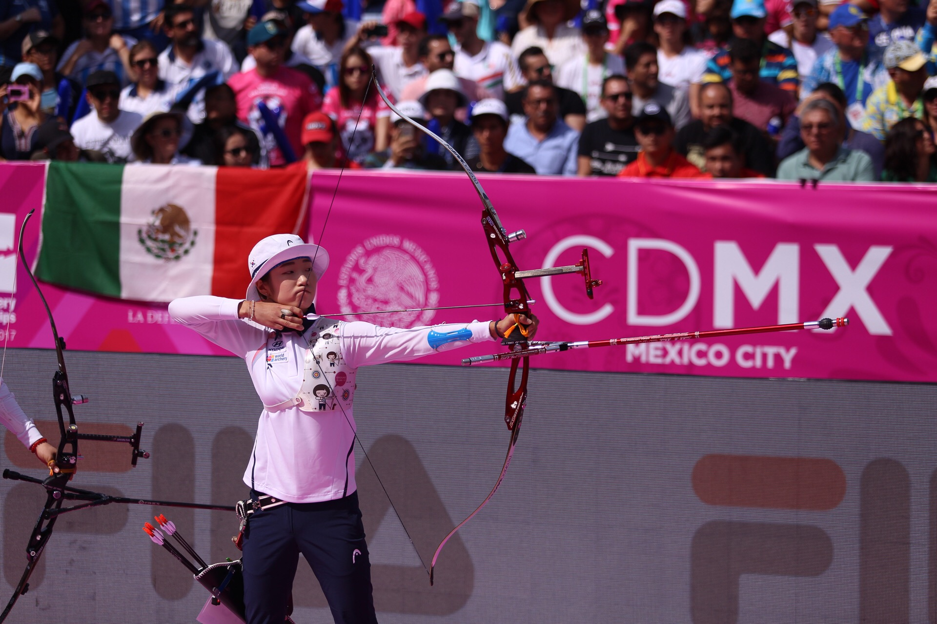 Campeonato de Tiro con Arco en el Zócalo de la Ciudad de México 2017